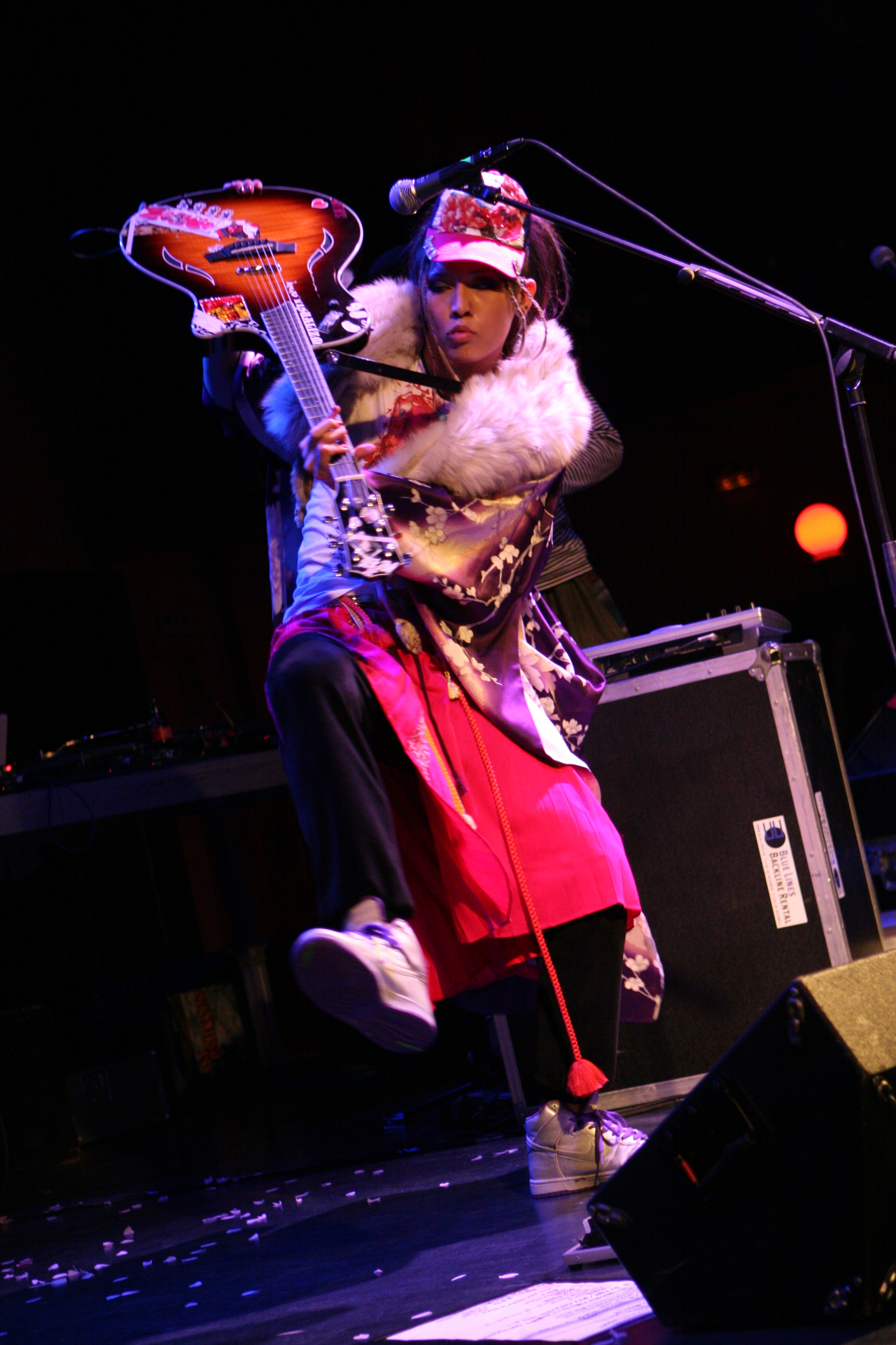 Miyavi en la la sala Apolo de Barcelona el 27 de Junio de 2008. Podéis leer una crónica del concierto en